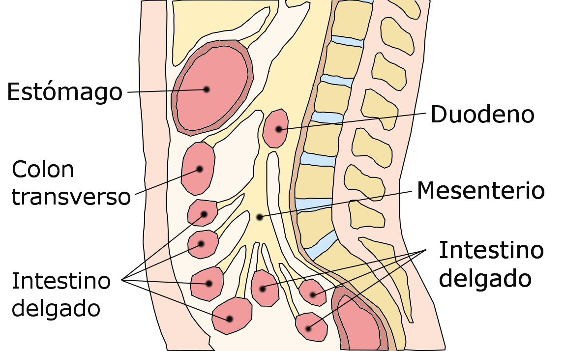 Vista lateral del abdomen en la que es visible el mesenterio que une las asas del intestino delgado a la pared abdominal posterior.